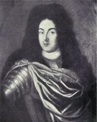 Portrait de Philippe Christophe comte de Kœnigsmark, petit-fils du maréchal suédois le comte Königsmarck - Assassiné en 1694 par la comtesse de Platen.